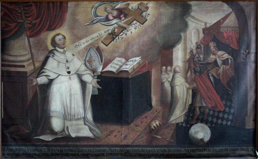 Vojtěch III. Salcburský arcibiskupLatina: Adalbertus III. Archiepiscopus Salisburgensis